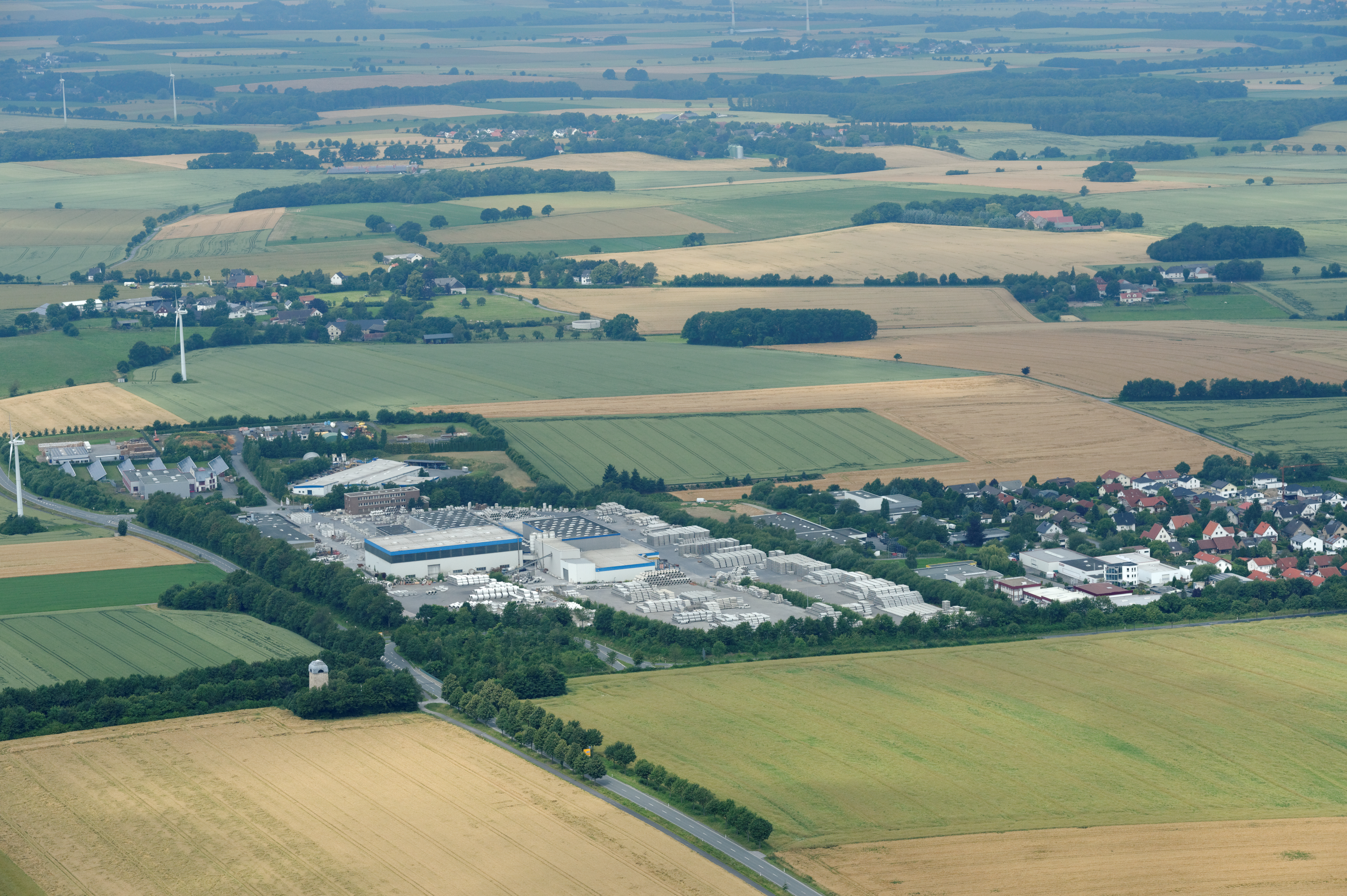 Fotoflug Sauerland-Nord. Möhnesee-Wippringsen (Gewerbegebiet) und Bismarckturm (Delecke)